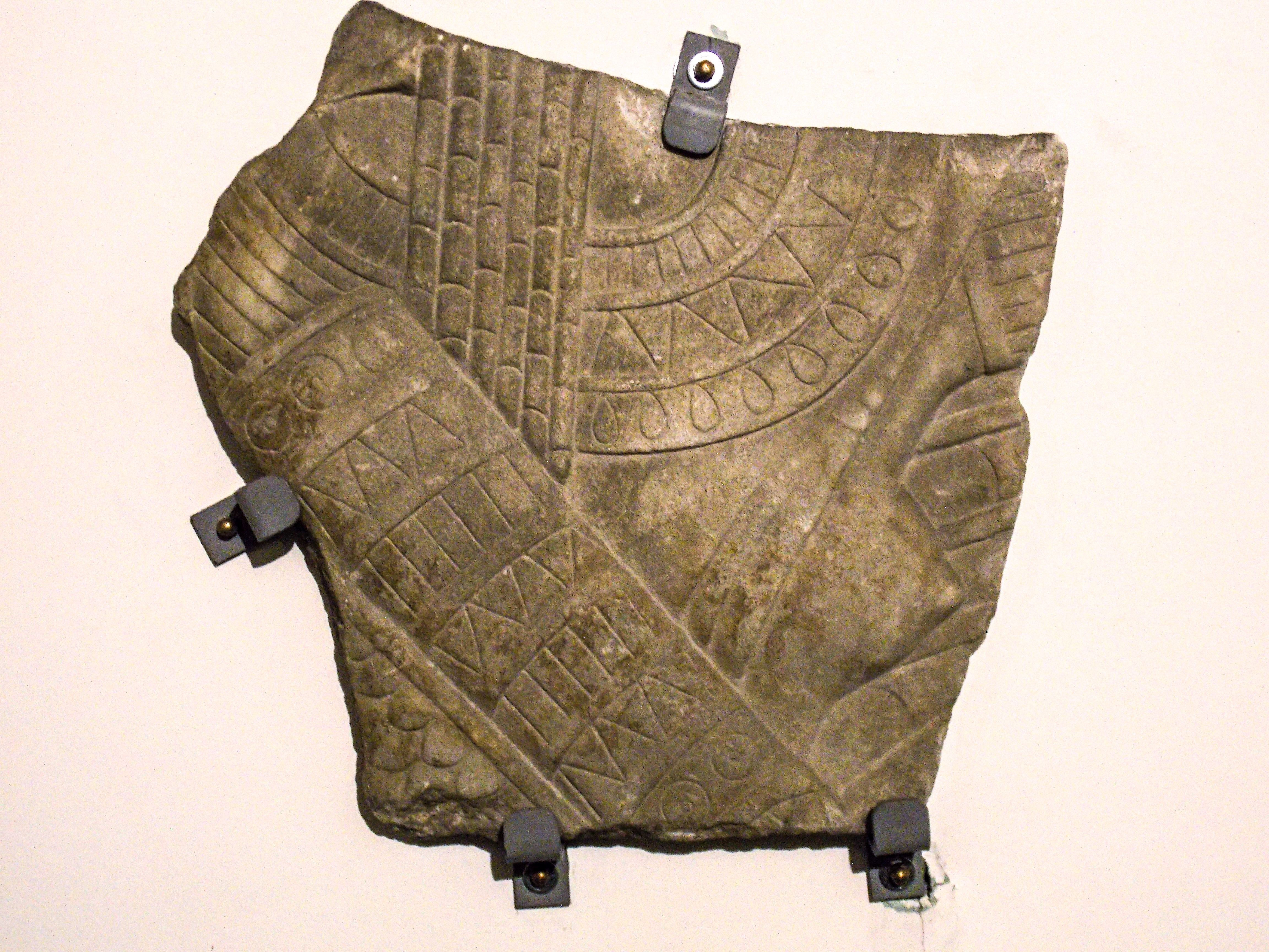 Un reperto del tempio di Iside di Benevento conservato nella sezione egizia del Museo del Sannio, presso il museo ARCOS. Frammento di bassorilievo